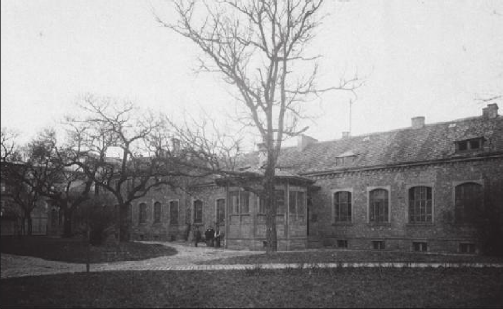 Chemisches Laboratorium am Polytechnikum Karlsruhe, erbaut 1851 (Architekt Oberbaurath Lang für Prof. Carl Weltzien), erweitert 1857/1875; Aufnahme um 1900